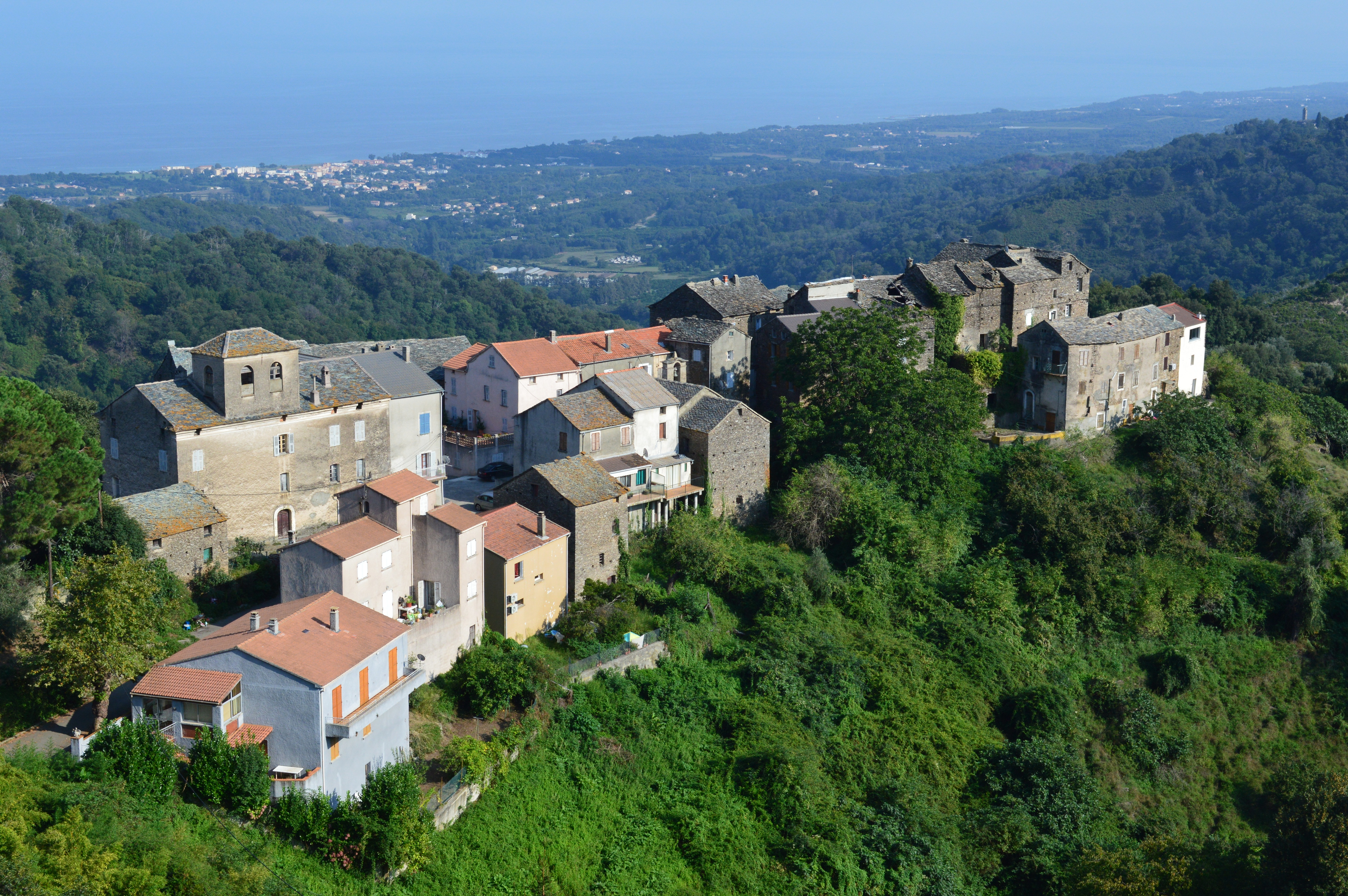 Hameau Orneto - Commune de Velone-Orneto